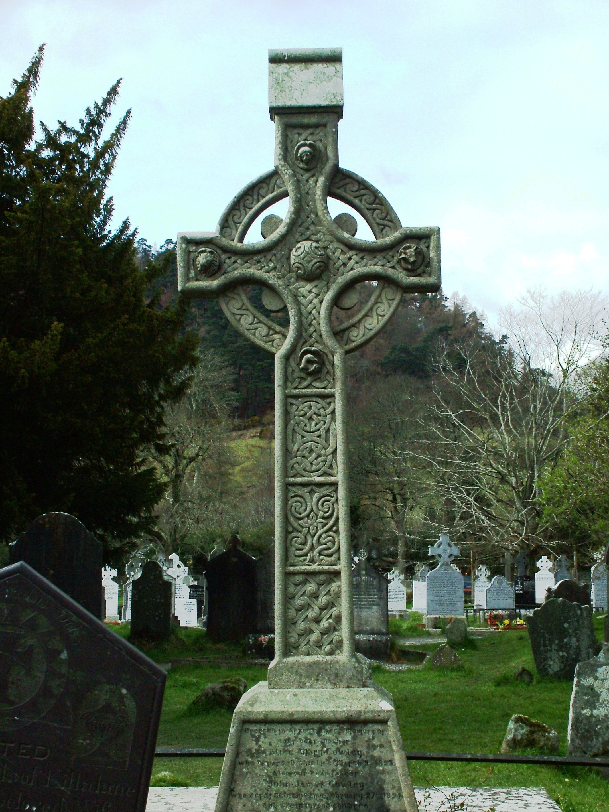 Glendalough: Temetői nagykereszt (Írország)